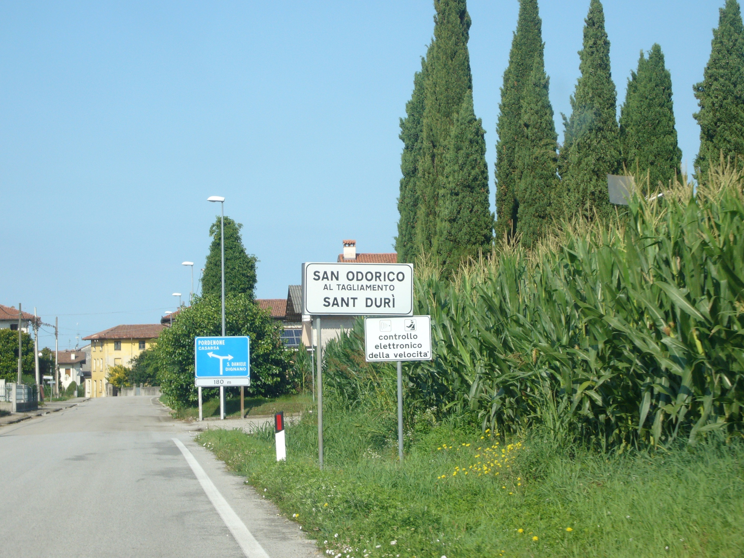 Targa posta all'ingresso del paese